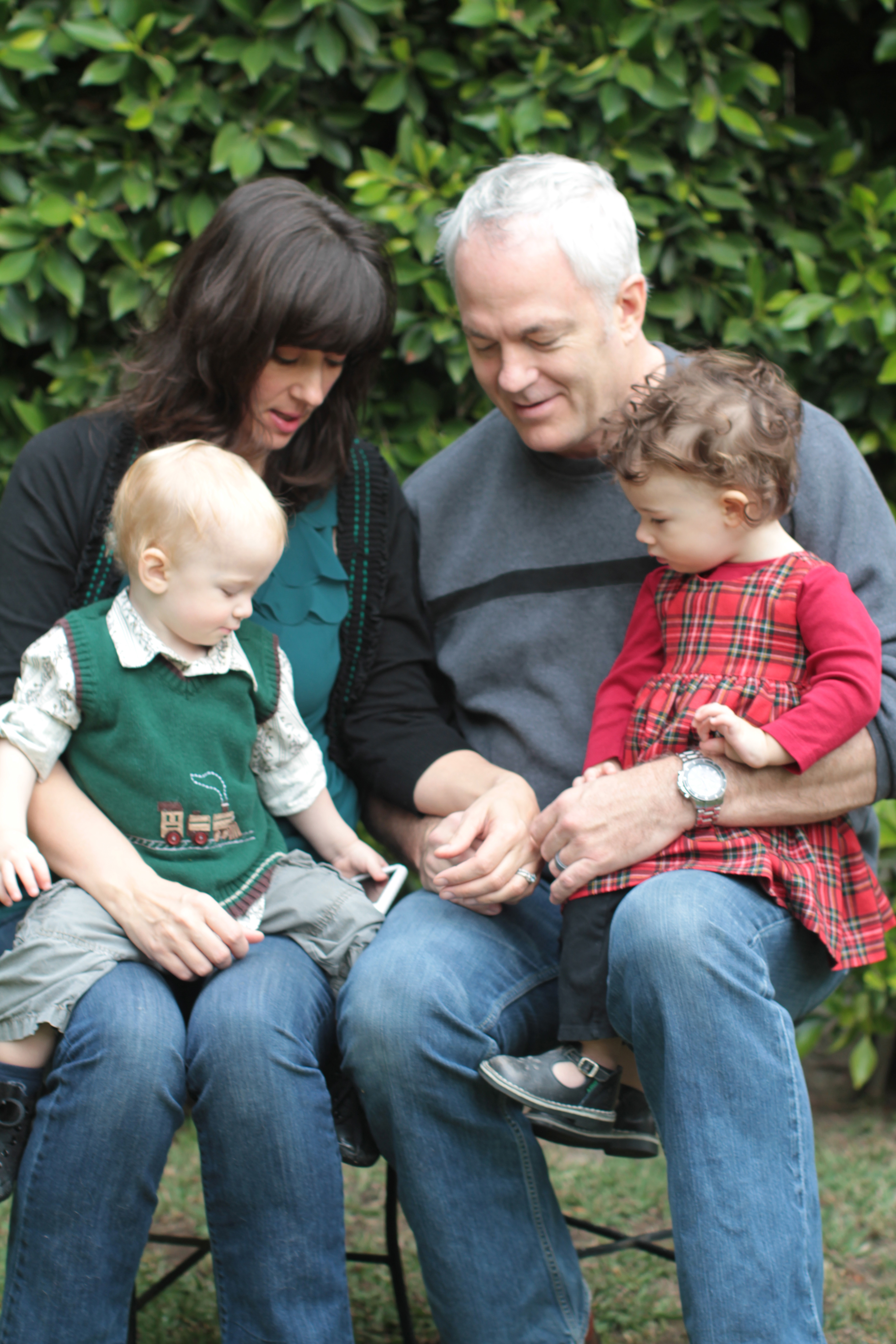 Rodzina przy śniadaniu lub rodzina na spacerze (tak, aby było widać, że członkowie rodziny ze sobą dyskutują, coś omawiają) English | Polski | +/−